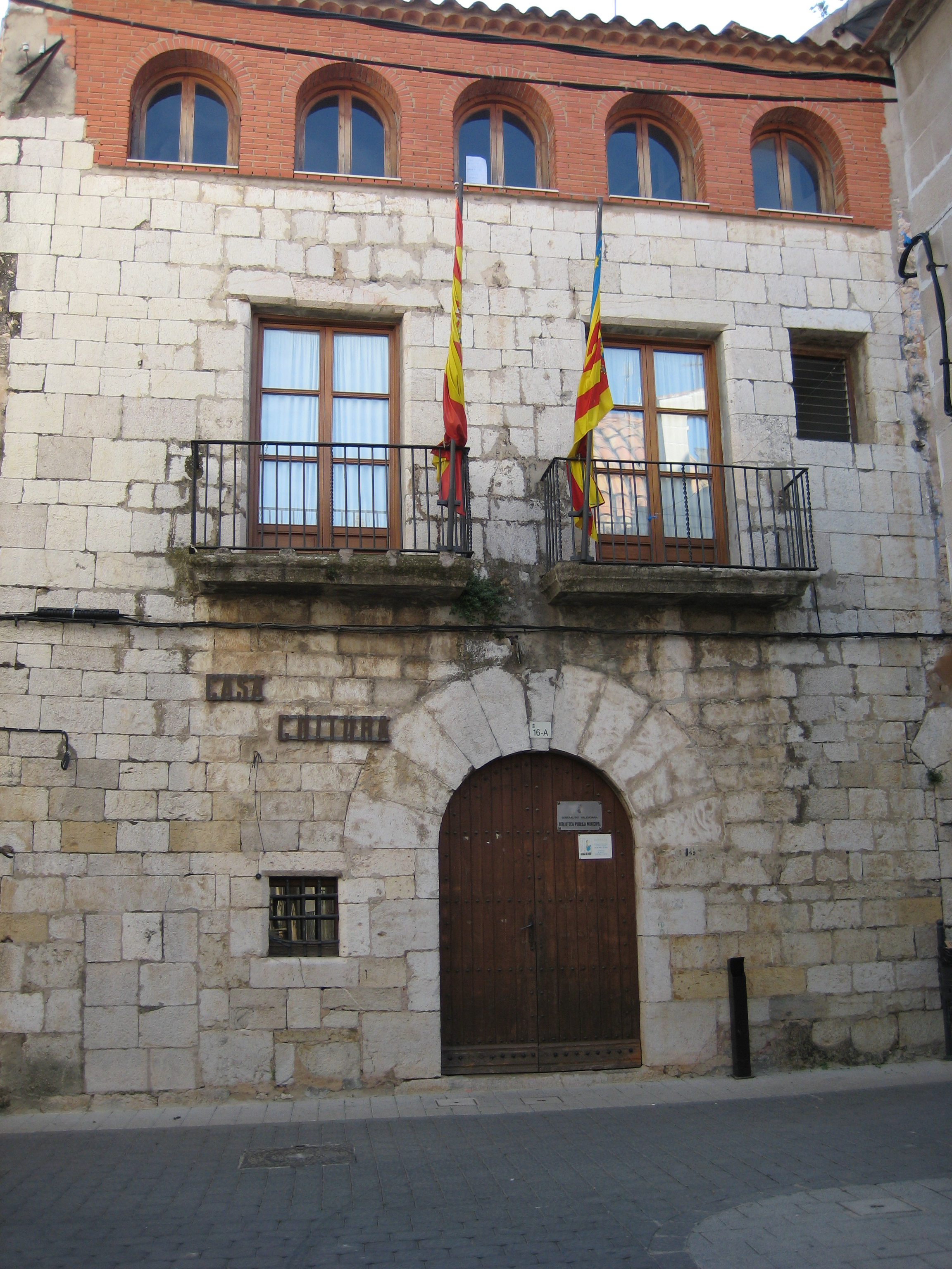 Casa de Cultura (antic Ajuntament) d'Alcalà de Xivert